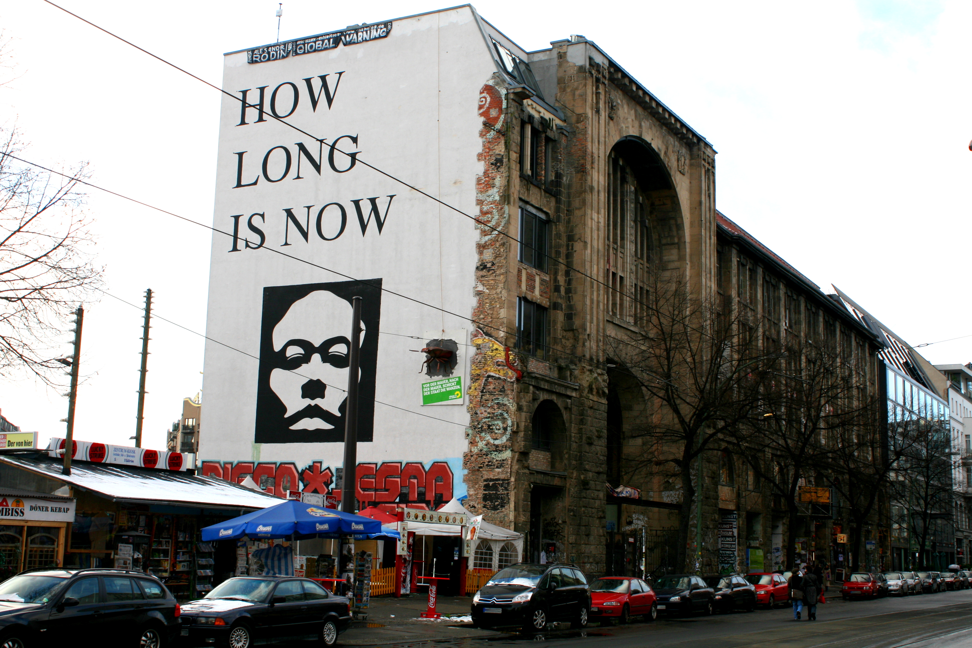 Kunsthaus Tacheles (Oranienburger Str., Berlin, Germany) seen from west